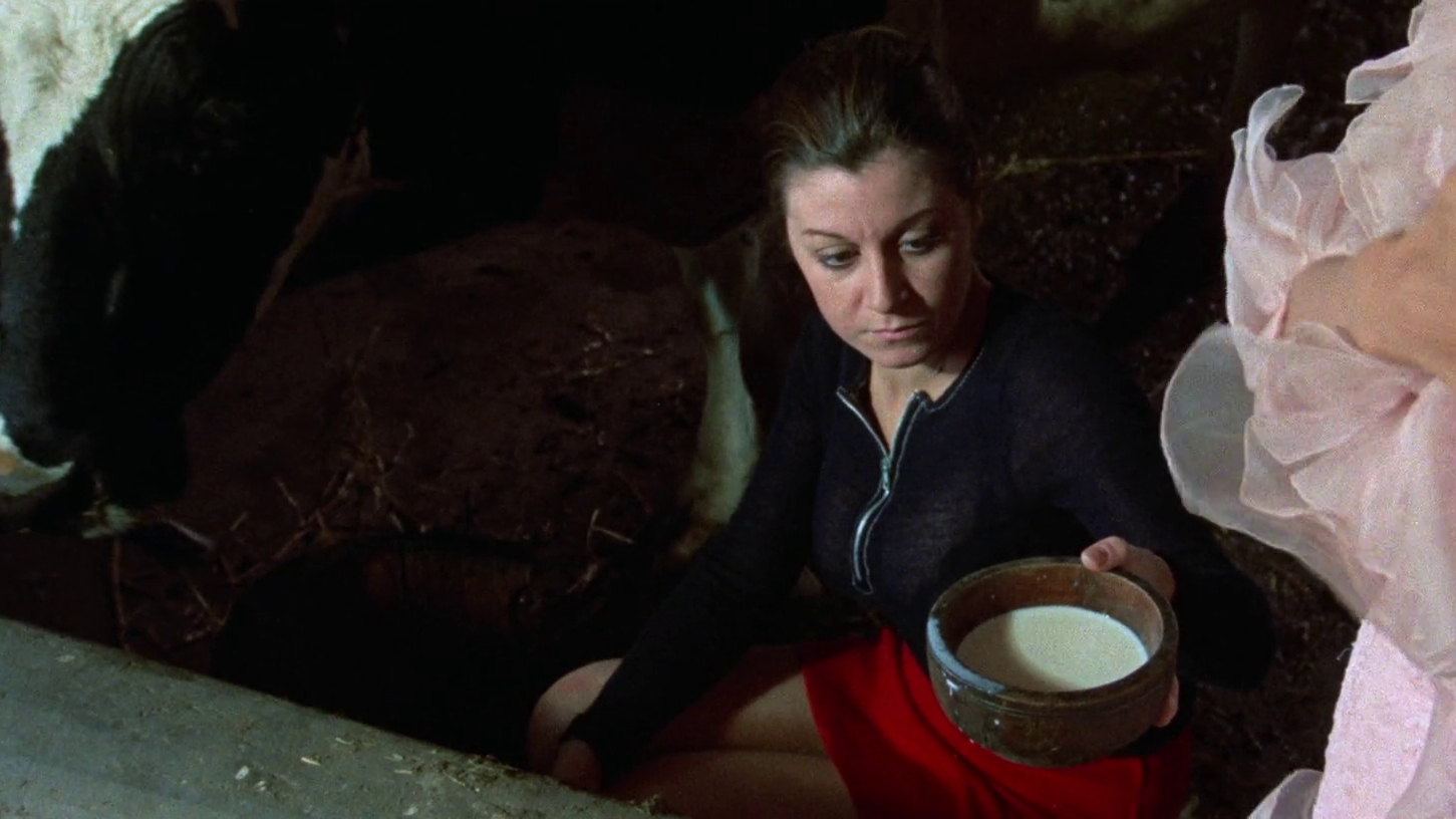 scena dal film Quelli che contano